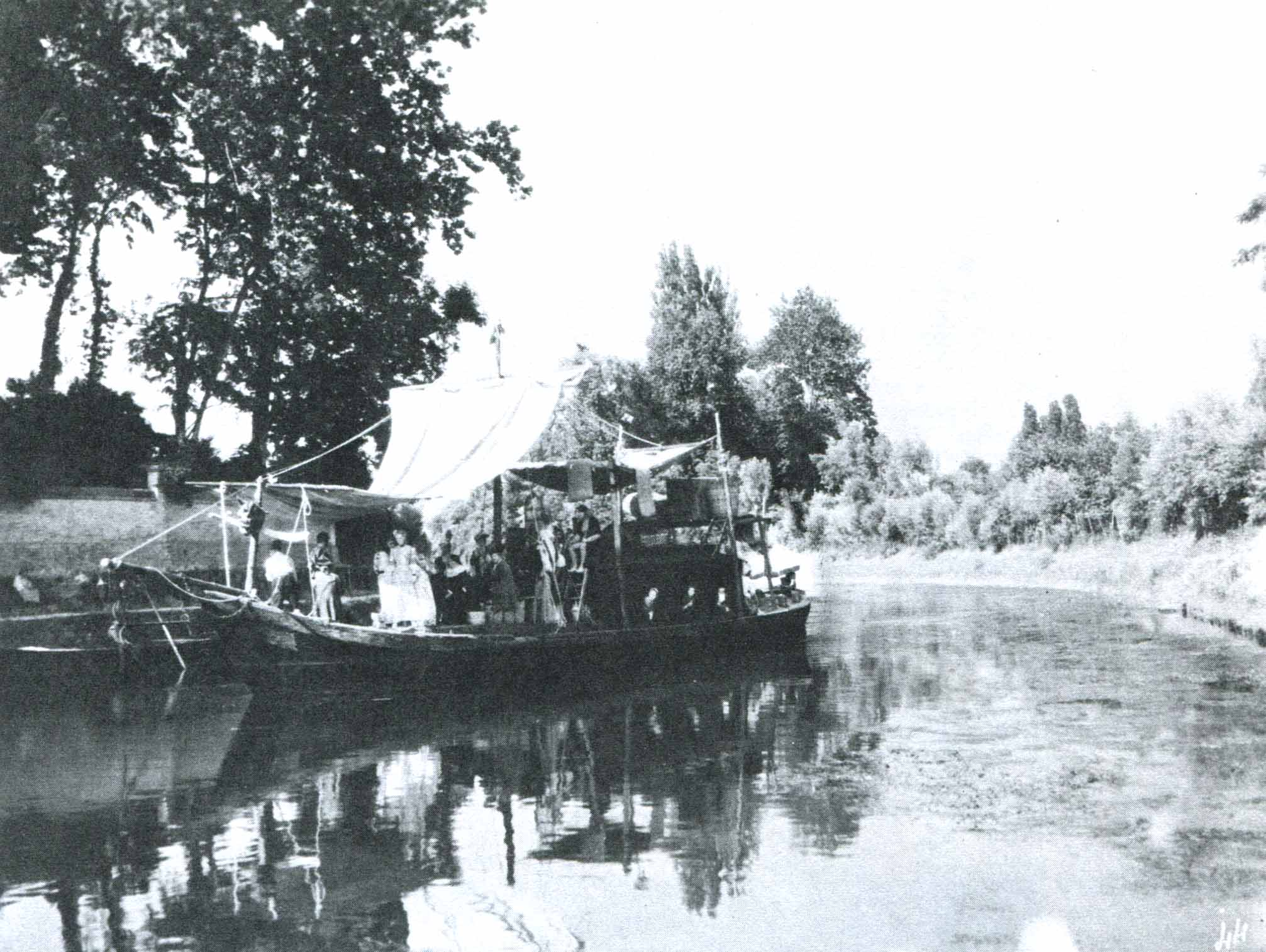 "La locandiera" (Chiarini, 1944), foto scena paesaggio